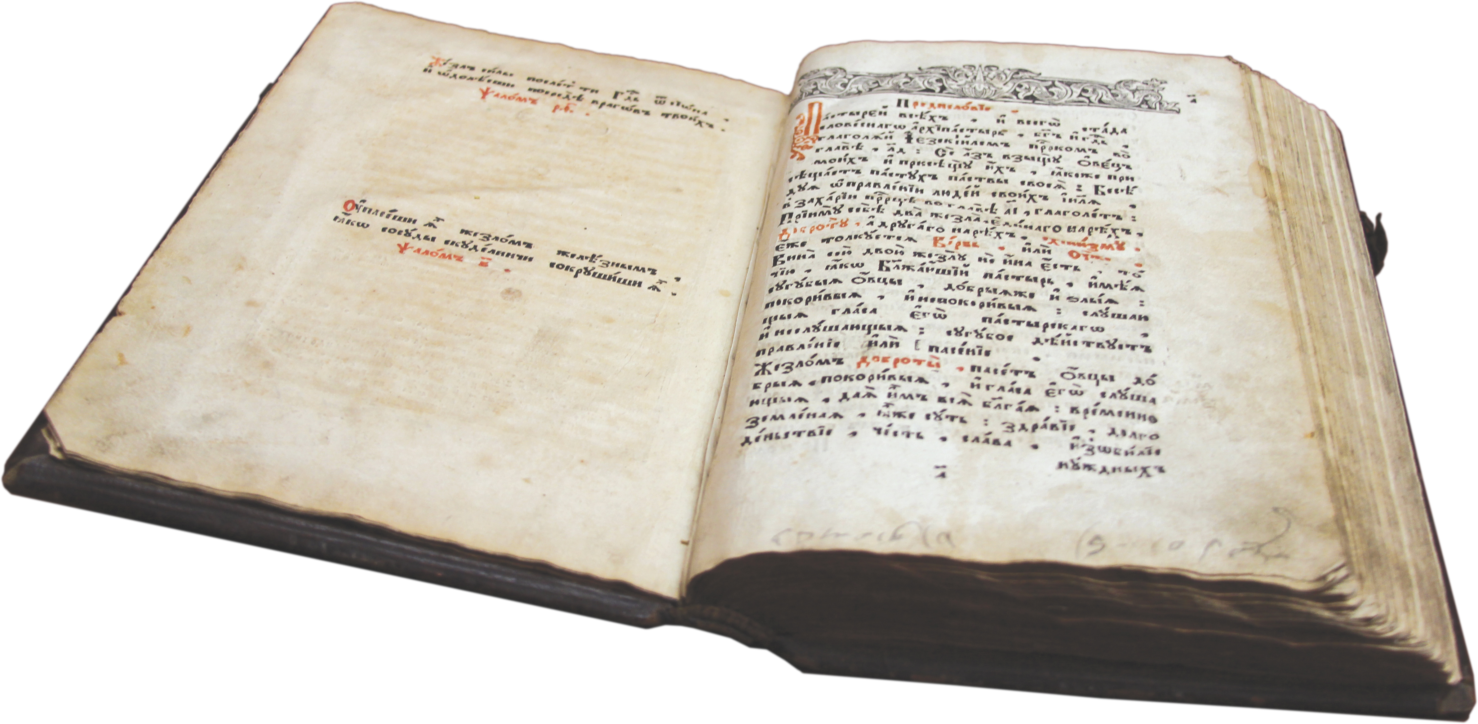 Симеон Полоцкий «Жезл правления» (обложка книги)